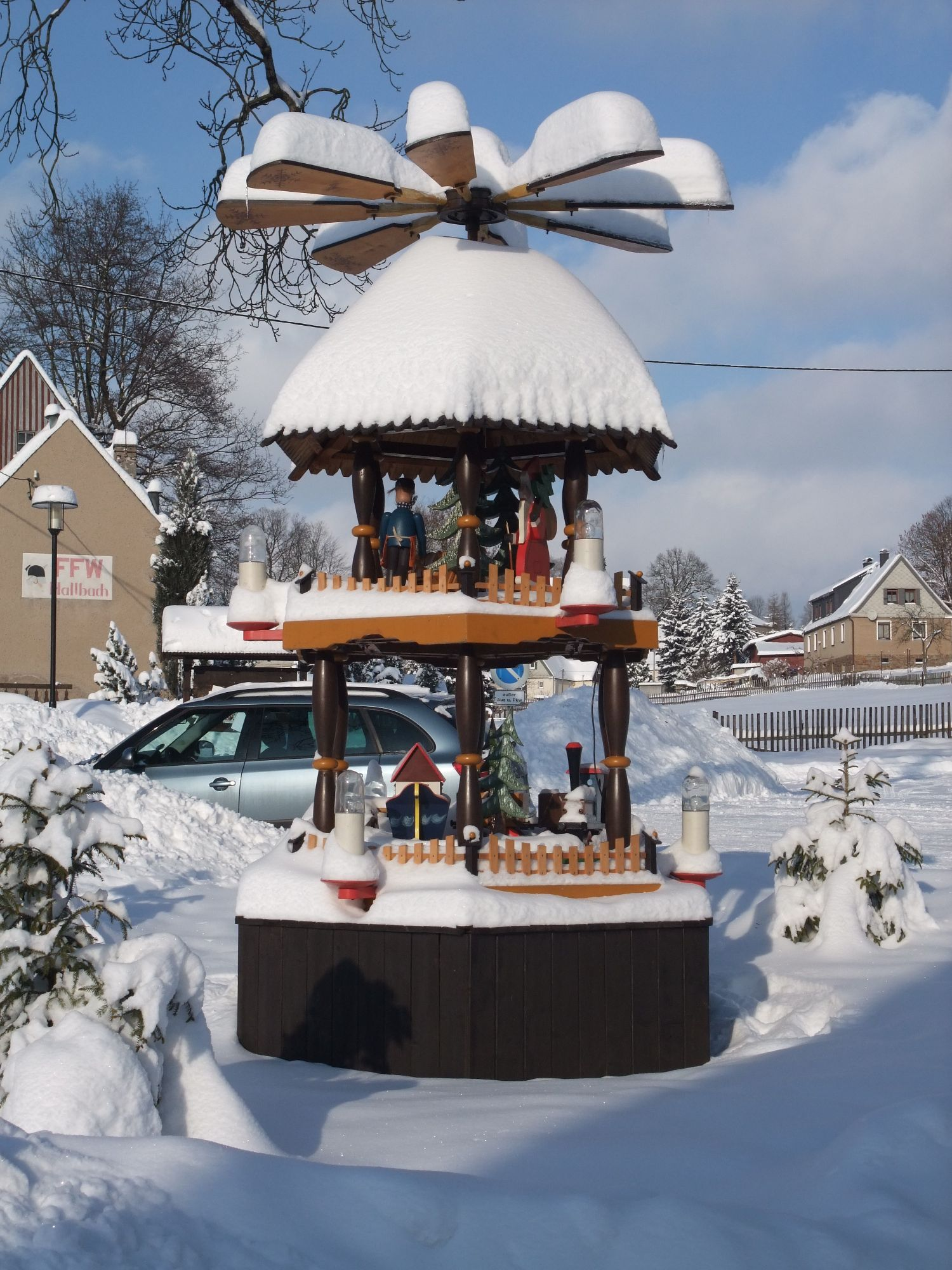 Die Ortspyramide im Pfaffrodaer Ortsteil Hallbach.